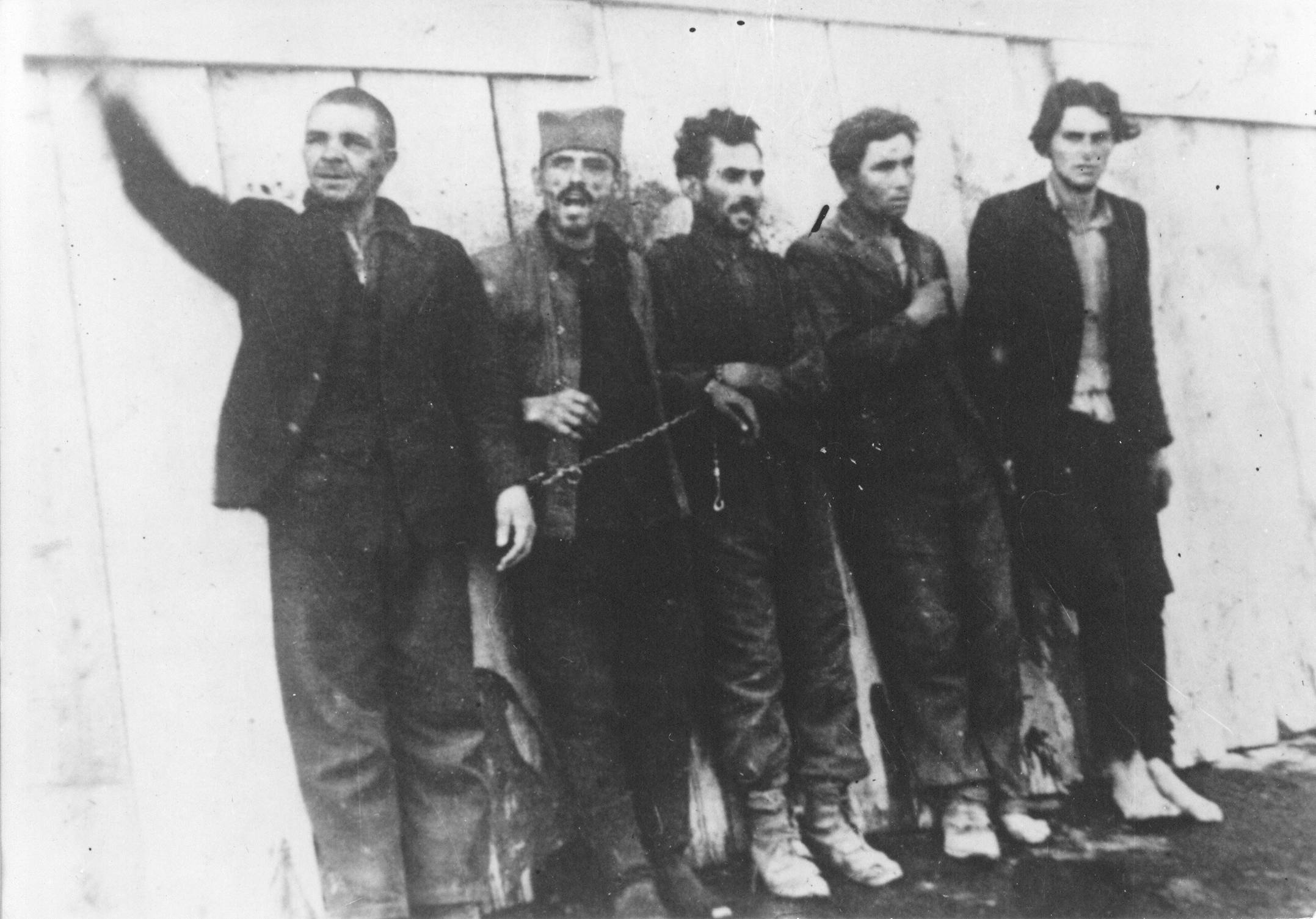 Srpskohrvatski / српскохрватски: Članovi KPJ pred streljanje u Ćupriji, od strane Nemaca, septembra 1941. godine.